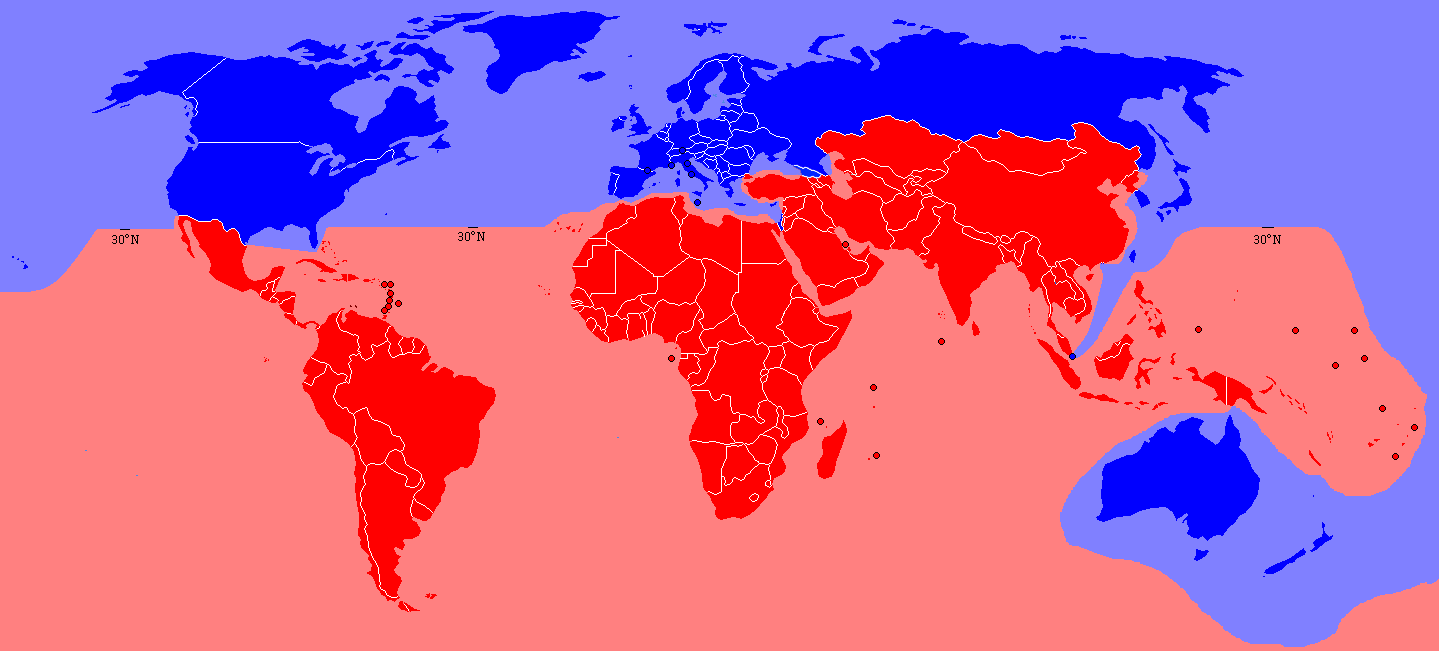 copiata da wiki en :en:Image:North South Divide 3.PNG Suddivisione del mondo in nord sud